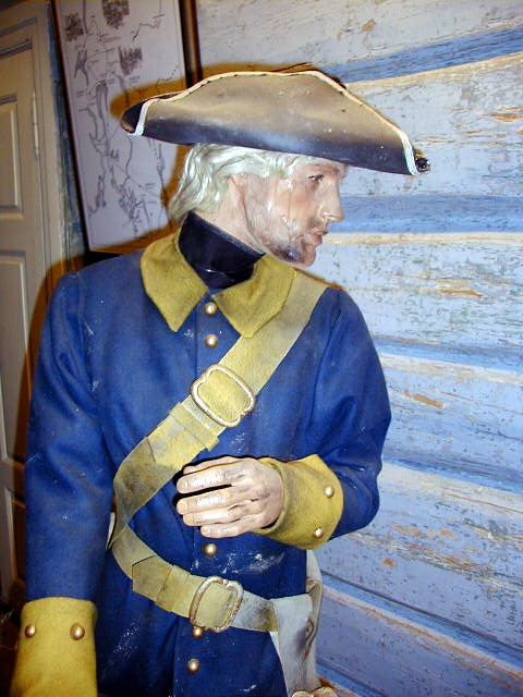 Svensk karoliner fra 1700-tallet